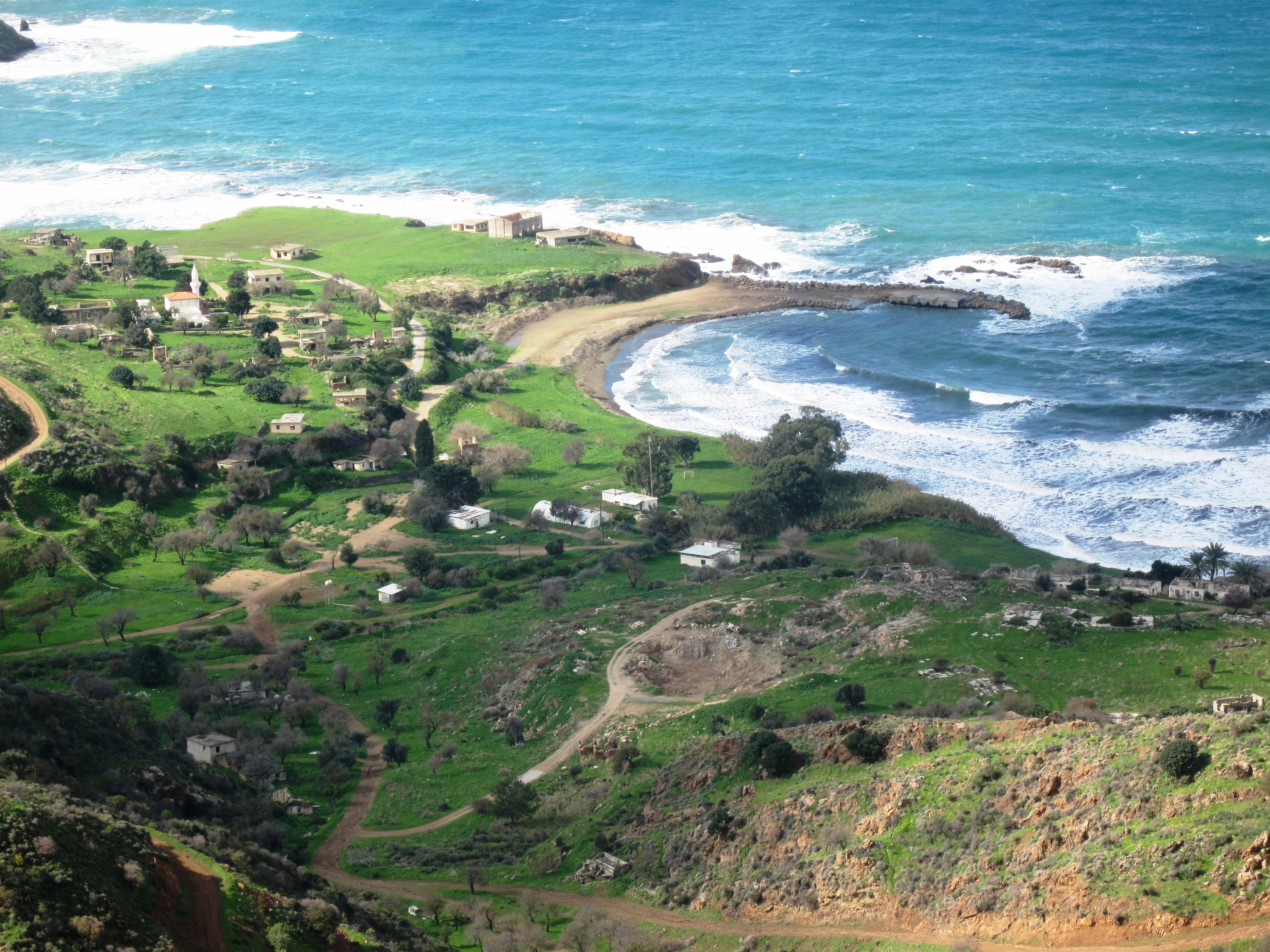 kokkina 4